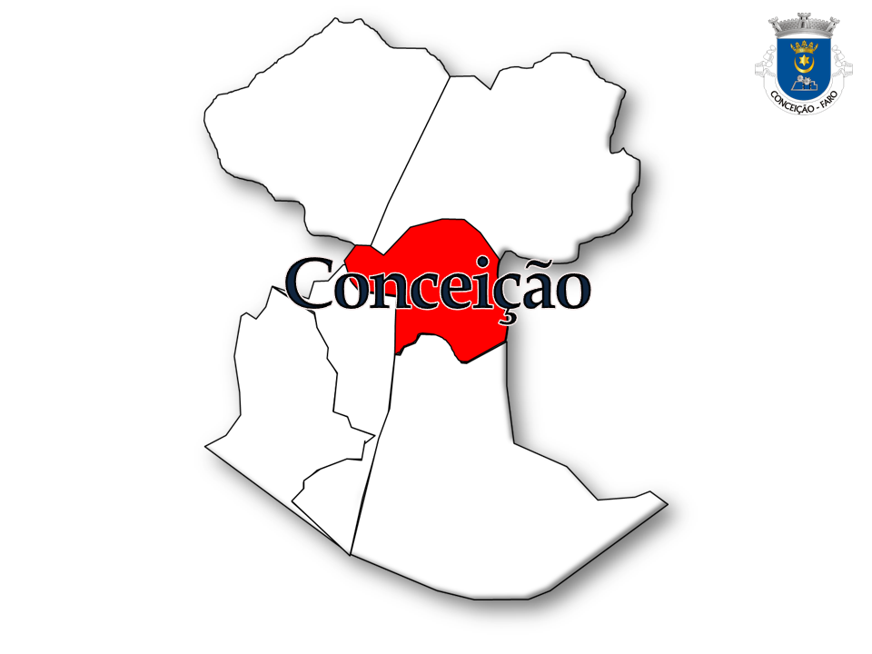 Censos 1864/2011